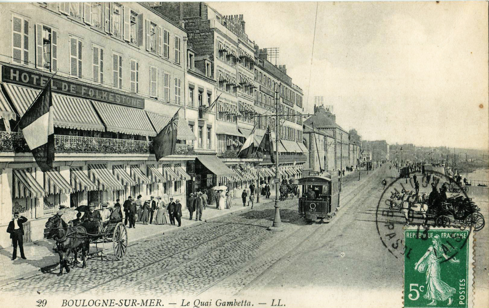 Carte postale ancienne éditée par LL, n°29 :BOULOGNE-SUR-MER - Le Quai Gambetta